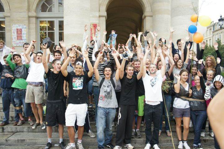 Une ola lors d'un évènement public